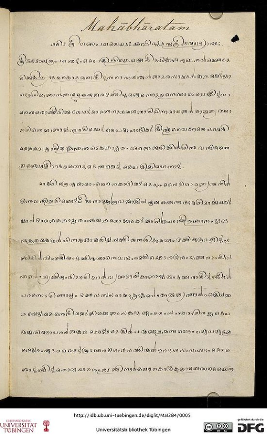 മഹാഭാരതം, അദ്ധ്യാത്മരാമായണം കിളിപ്പാട്ട് – കൈയെഴുത്ത് പ്രതി (1870)